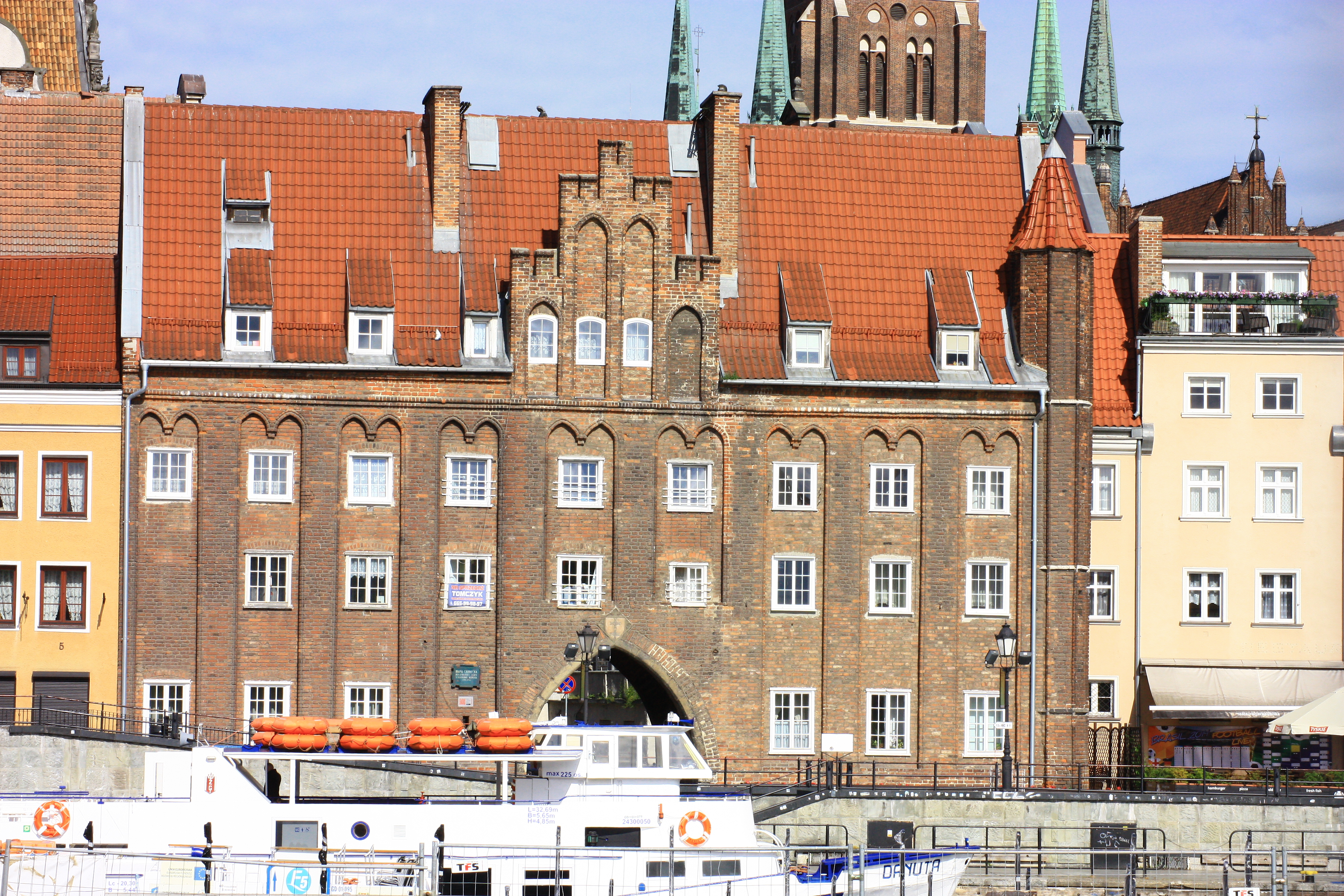 Gdańsk Główne Miasto, ul. Chlebnicka - Brama Chlebnicka, XIV, XVII